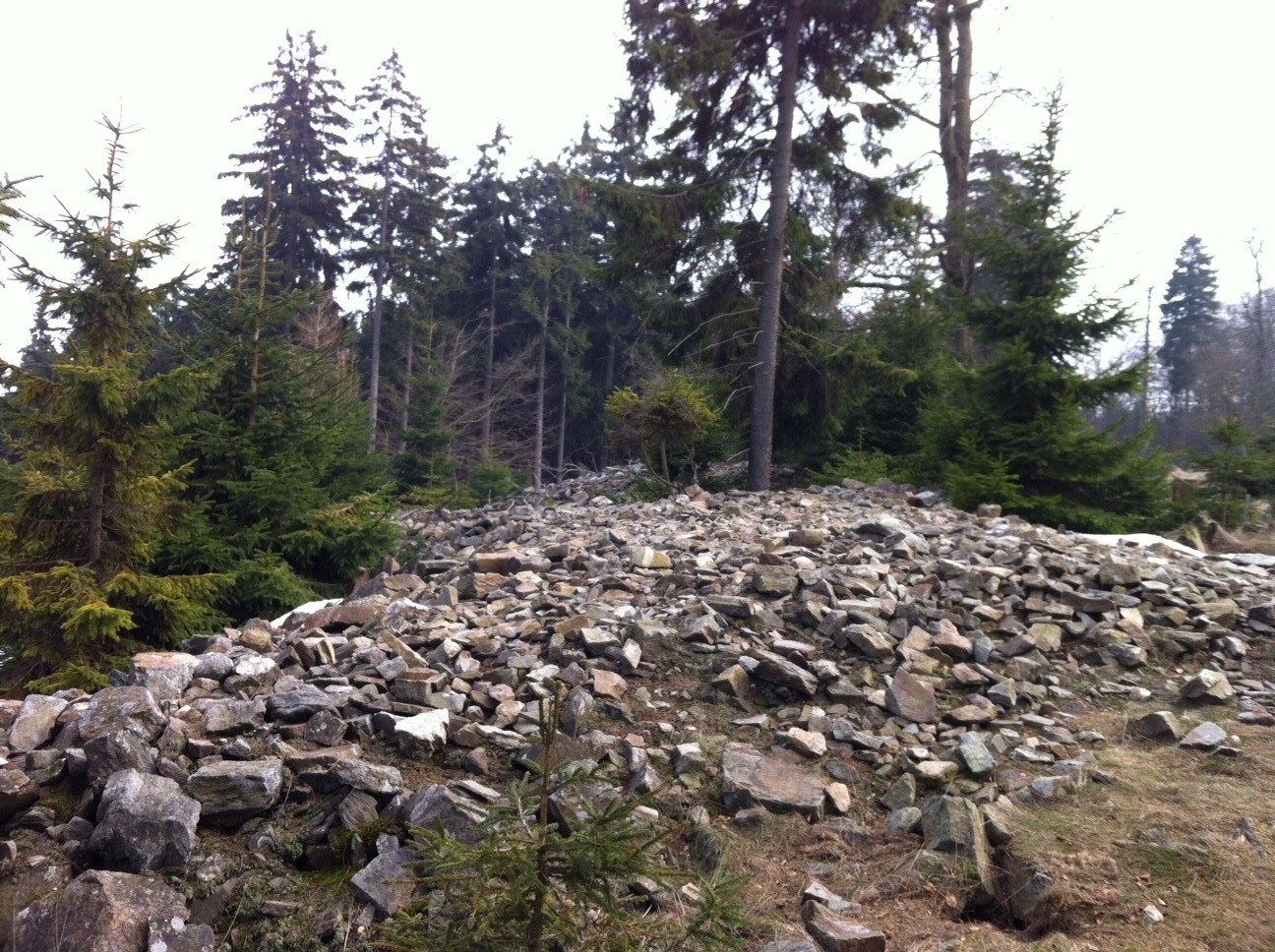 äußerer Ringwall Altkönig